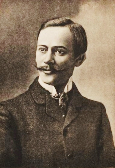 Ivan Platonovič Kaljaev